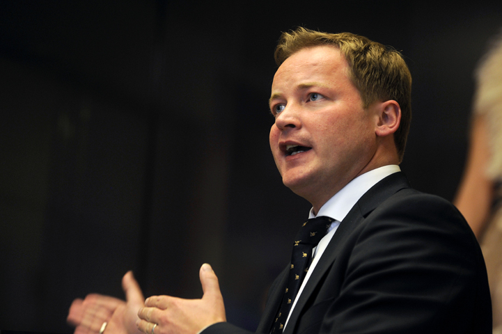 Daniel Sieveke bei einer Rede im Rahmen des Landtagswahlkampfes 2010